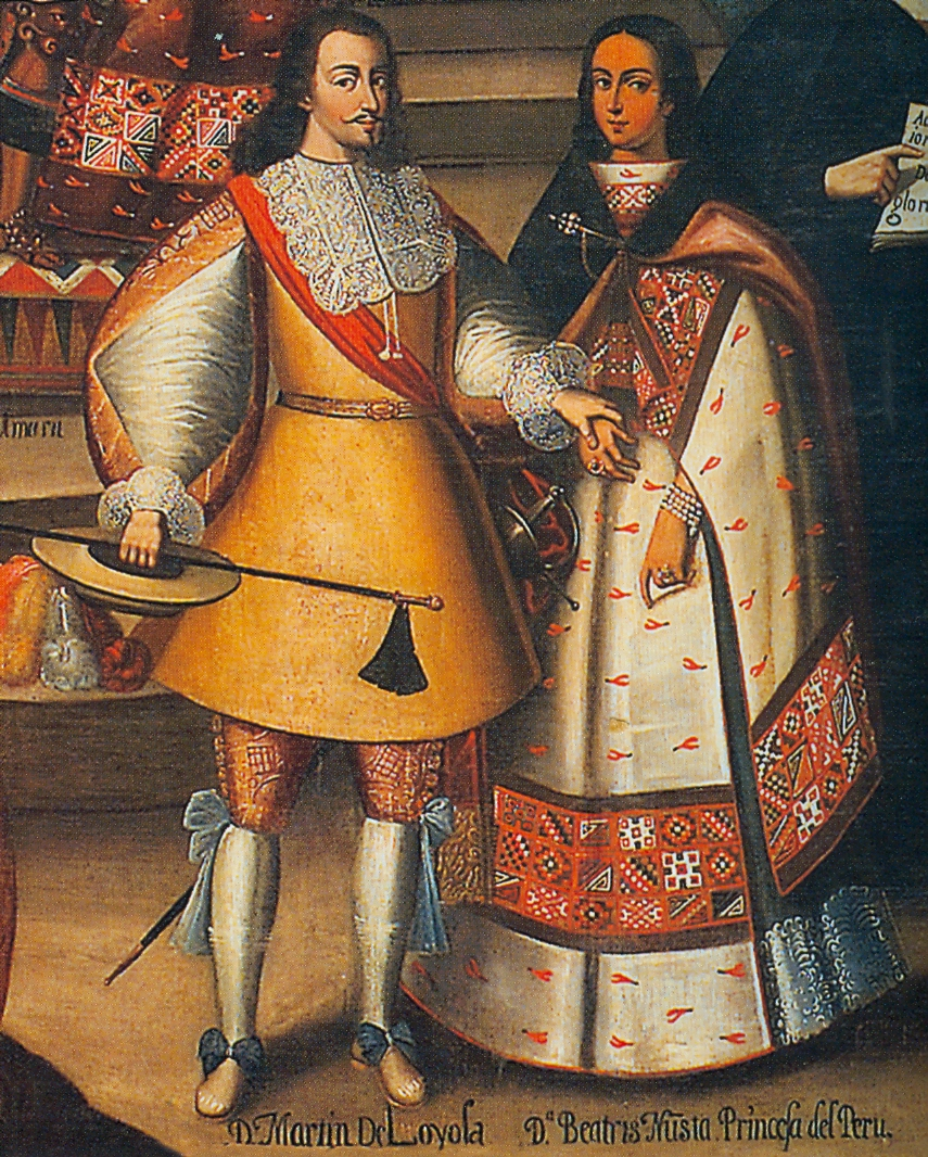 Martín García Óñez de Loyola and Beatriz Clara Coya. Detail of the Marriage of Martin de Loyola to Princess Dona Beatriz and Don Juan Borja to Lorenza (Ana María Lorenza de Loyola y Coya, daughter of Martin and Beatriz).